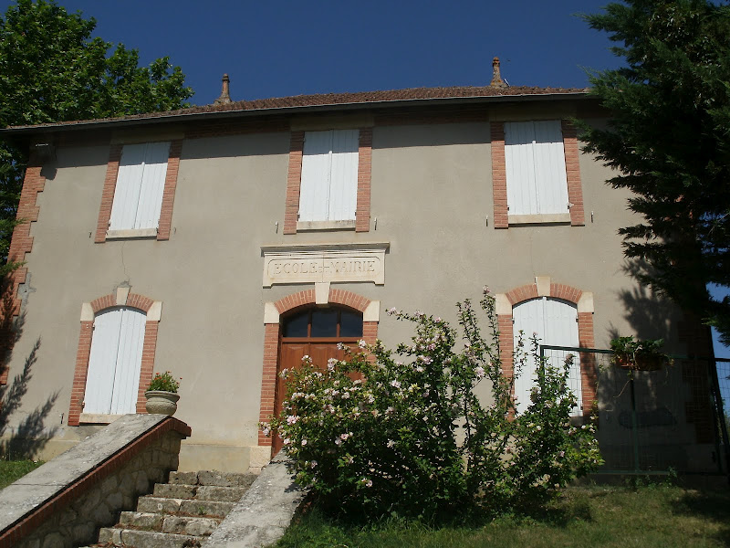 Ancienne Ecole - Mairie de Gavarret-sur-Aulouste